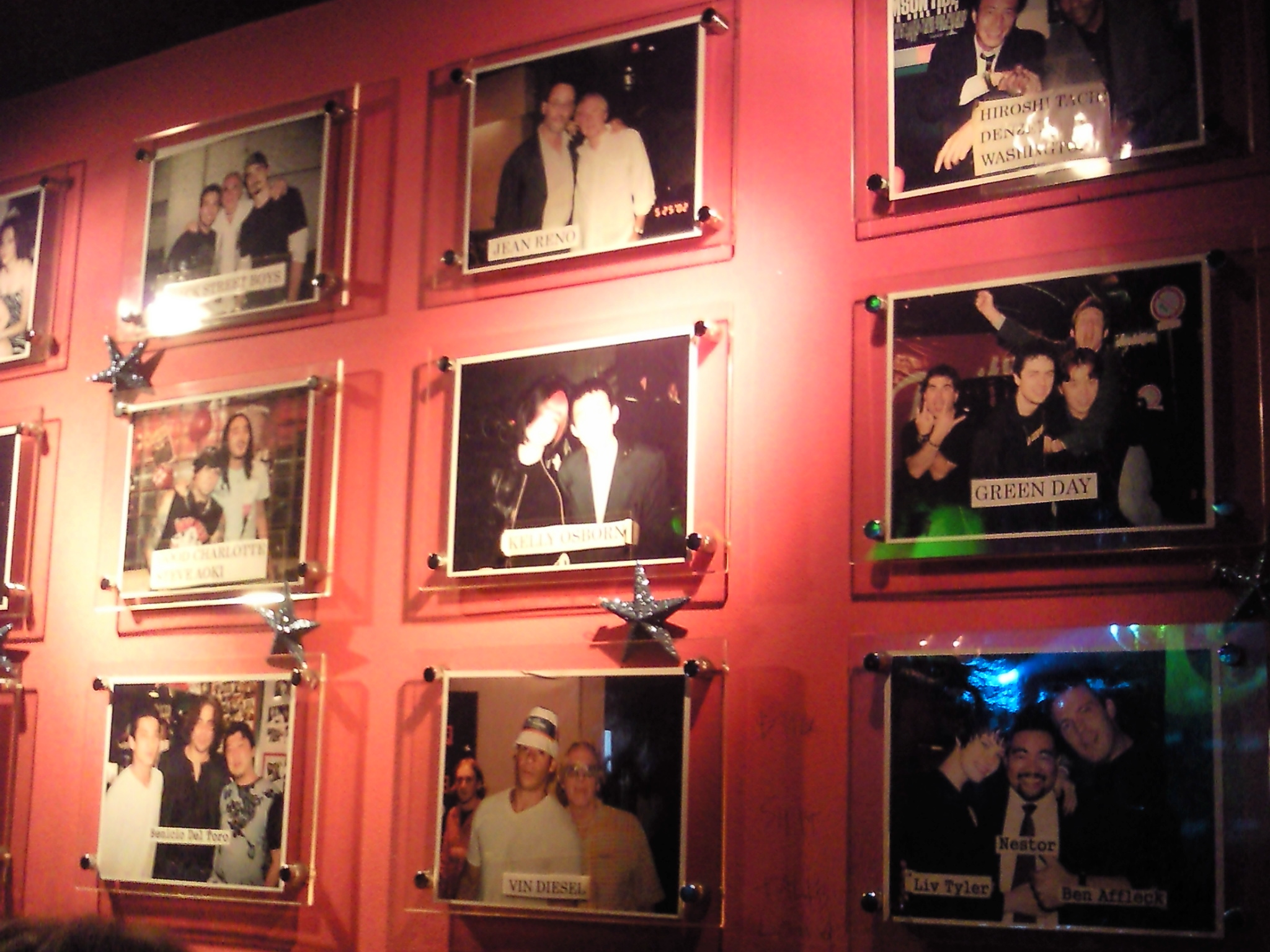 Ich habe dieses Bild im öffentlichen Bereich der Disko "New Lex" aufgenommen; die Fotos innerhalb des Bildes sind öffentlich ausgehängt.